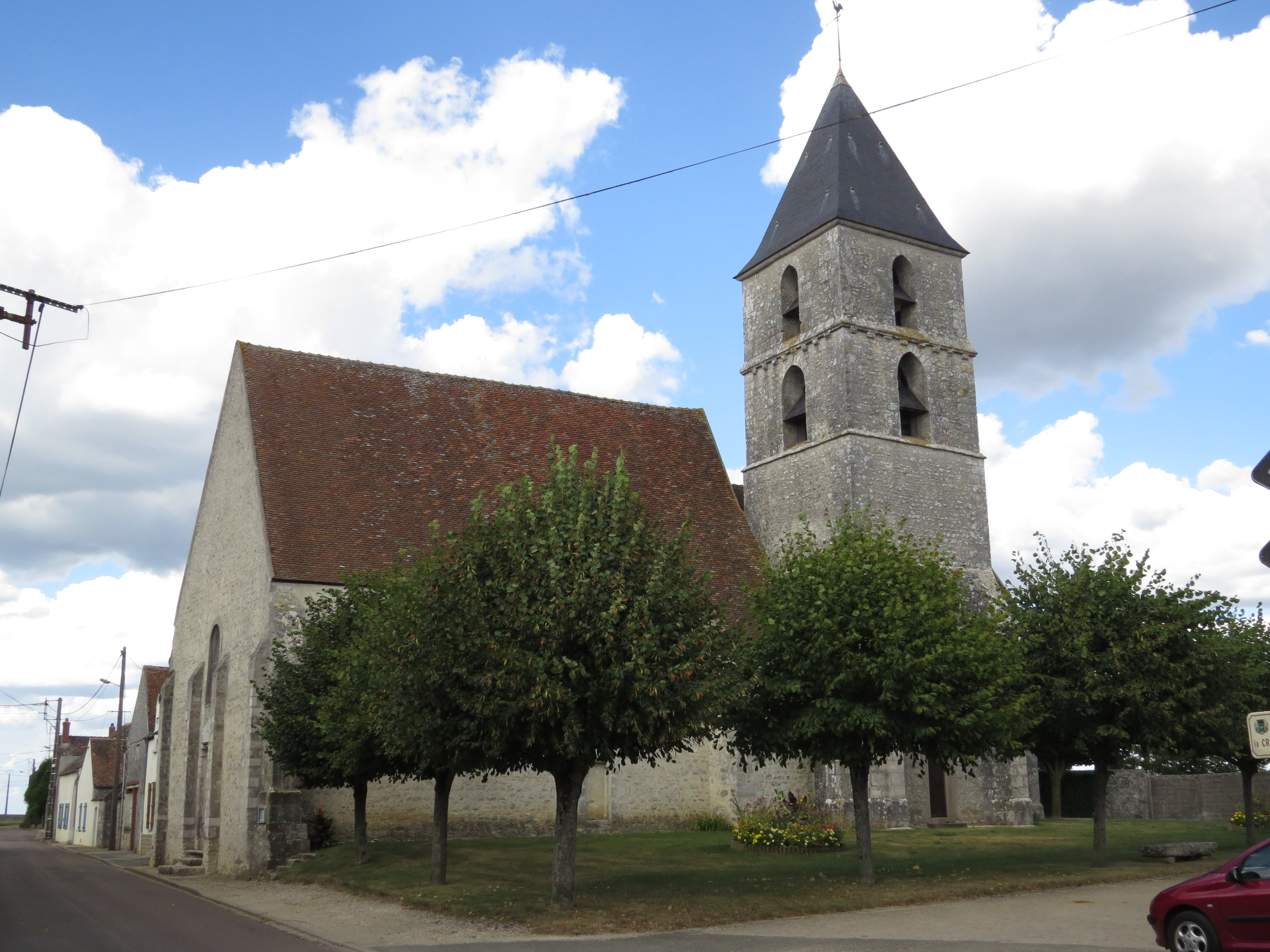 Église de la Nativité-de-la-Sainte-Vierge de Bougligny (Inscrit) .